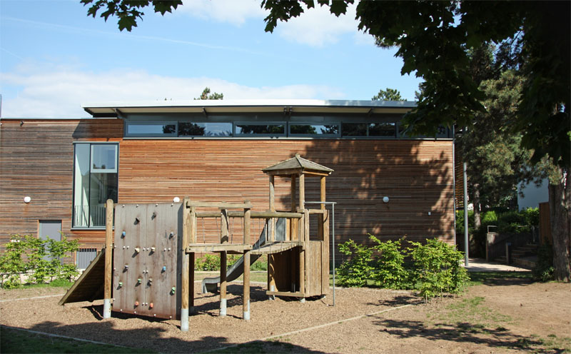 Heinrich-Heine-Schule Darmstadt Schulhof und Turnhalle